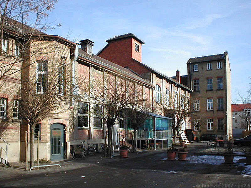 Alte Zigarrenfabrik in Heilbronn, heute Kulturzentrum